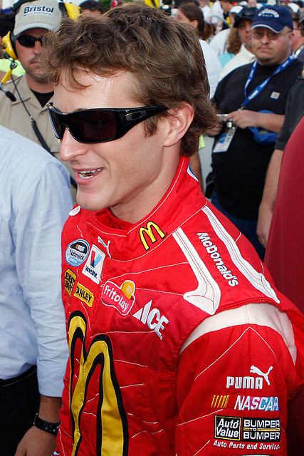 Kasey Kahne